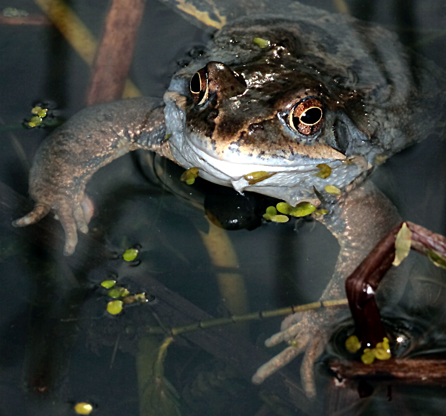 Grasfrosch